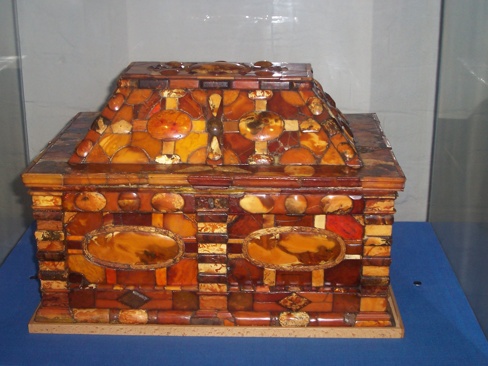 Bursztynowa szkatula